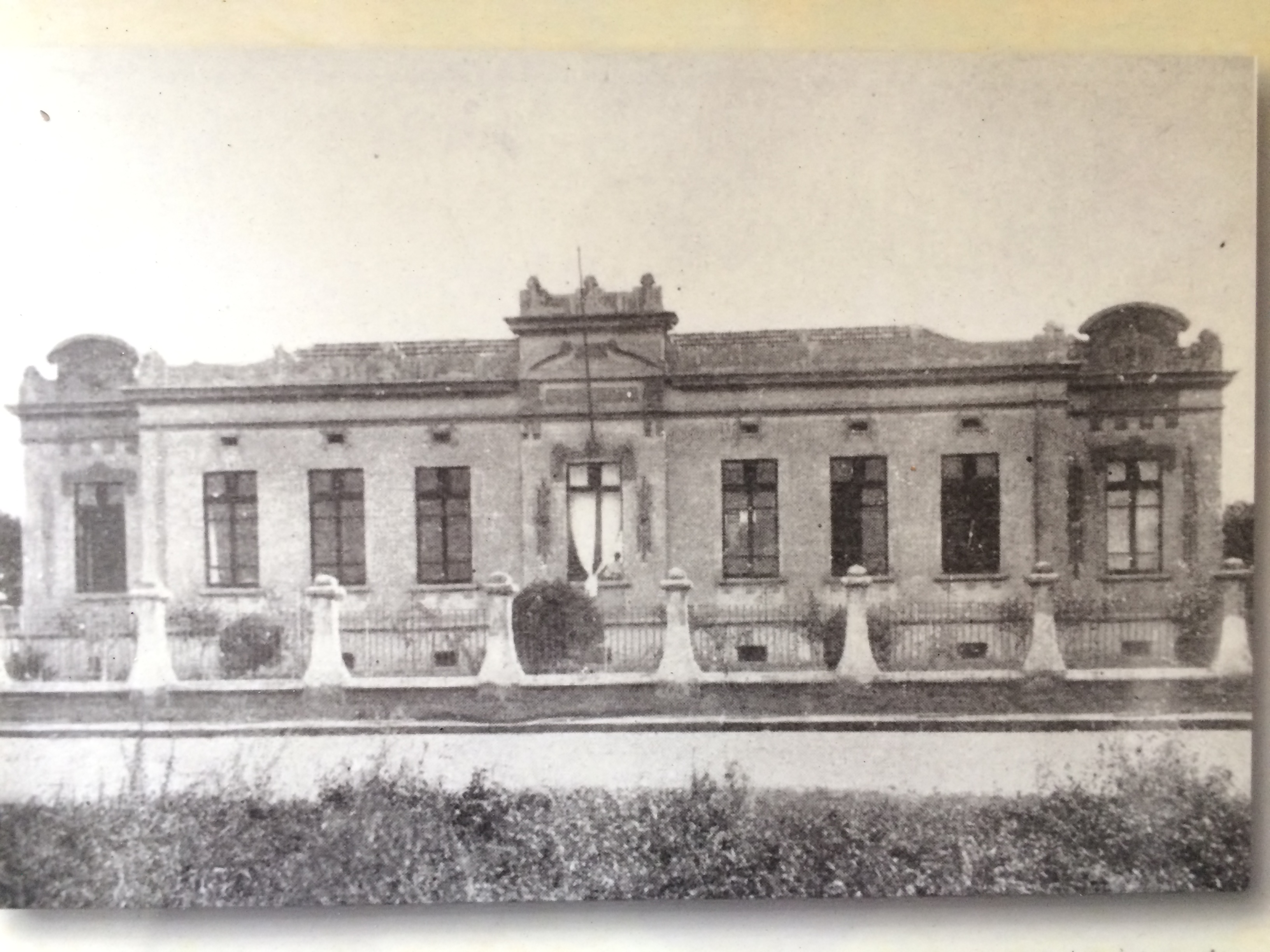 Reprodução da fachada do Museu de Santo André Dr. Octaviano Armando Gaiarsa, em Santo André (SP), Brasil, década de 1930. Coleção Euclydes Rocco, acervo MSAOAG.